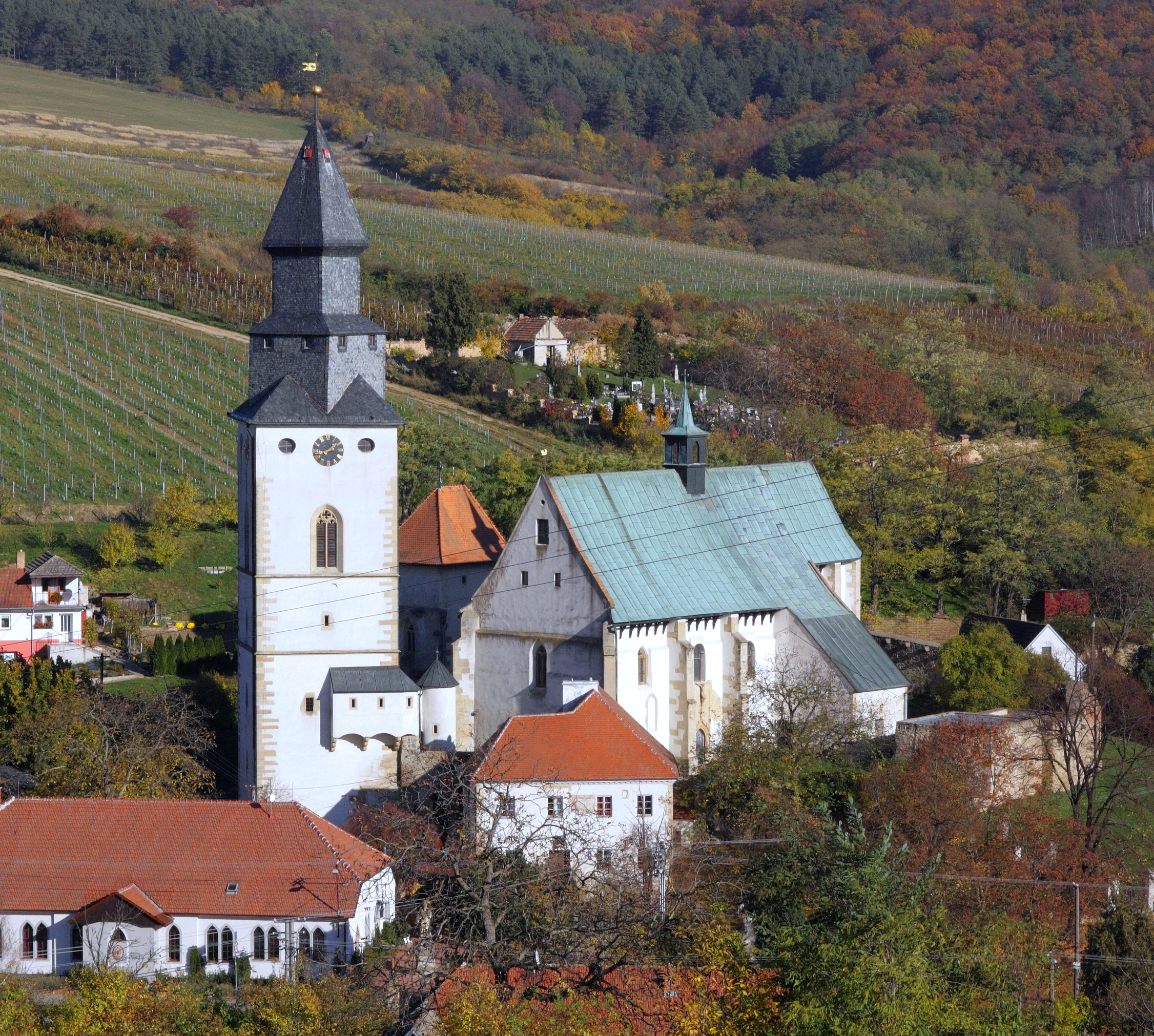 Kurdějov - kostel svatého Jana Křtitele, pohled od západu.